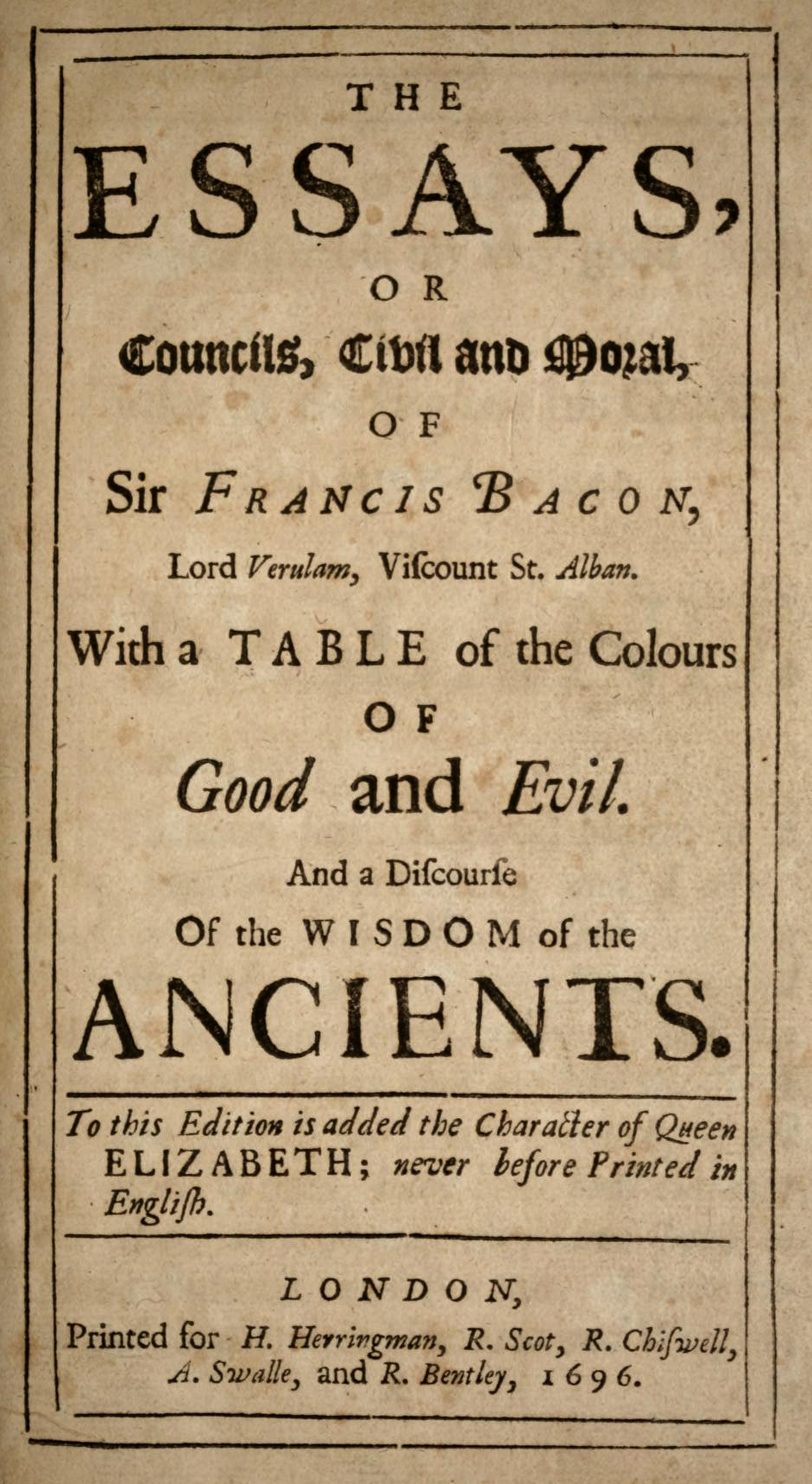 1696 title page